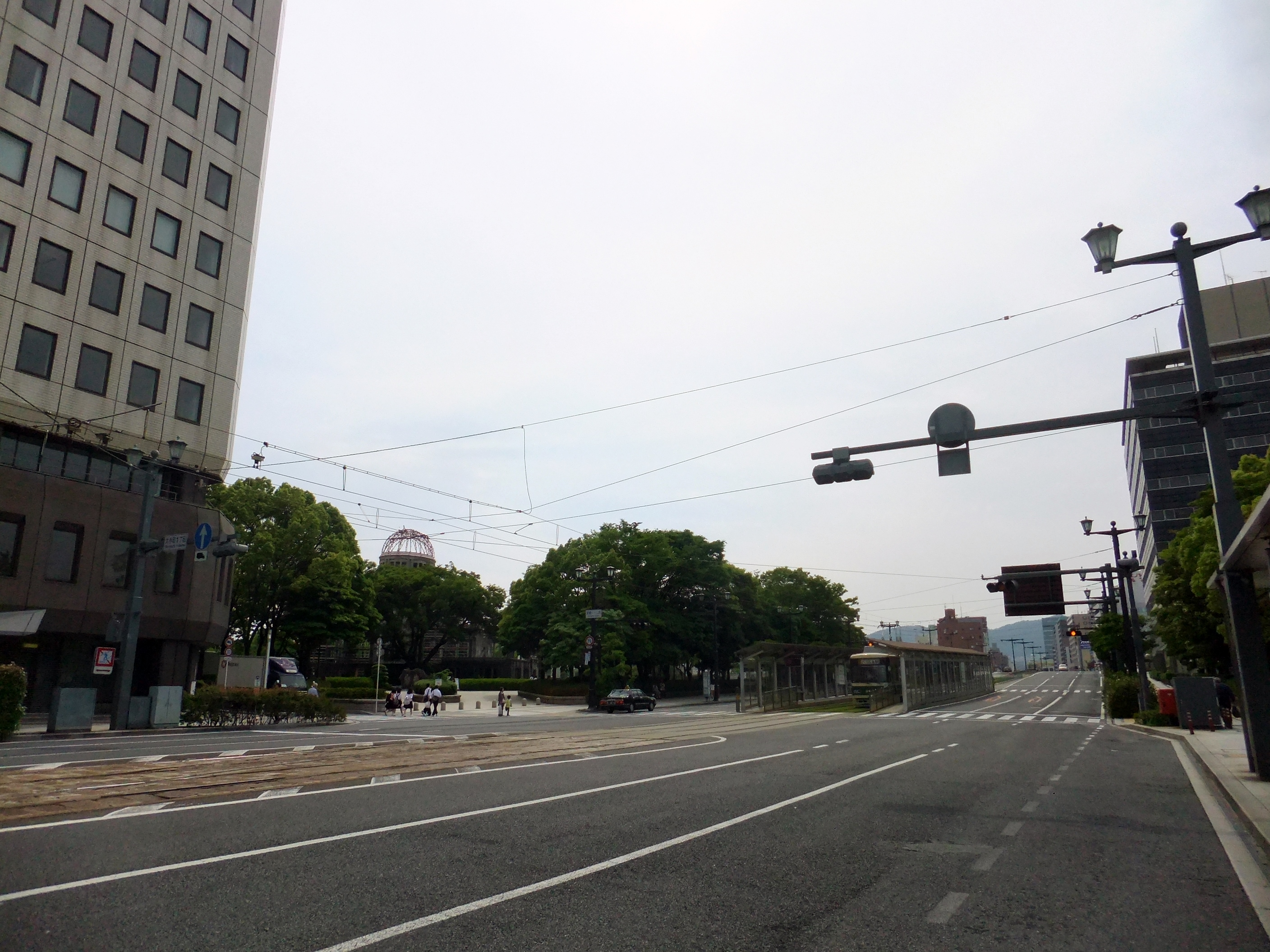 広島電鉄 原爆ドーム前駅